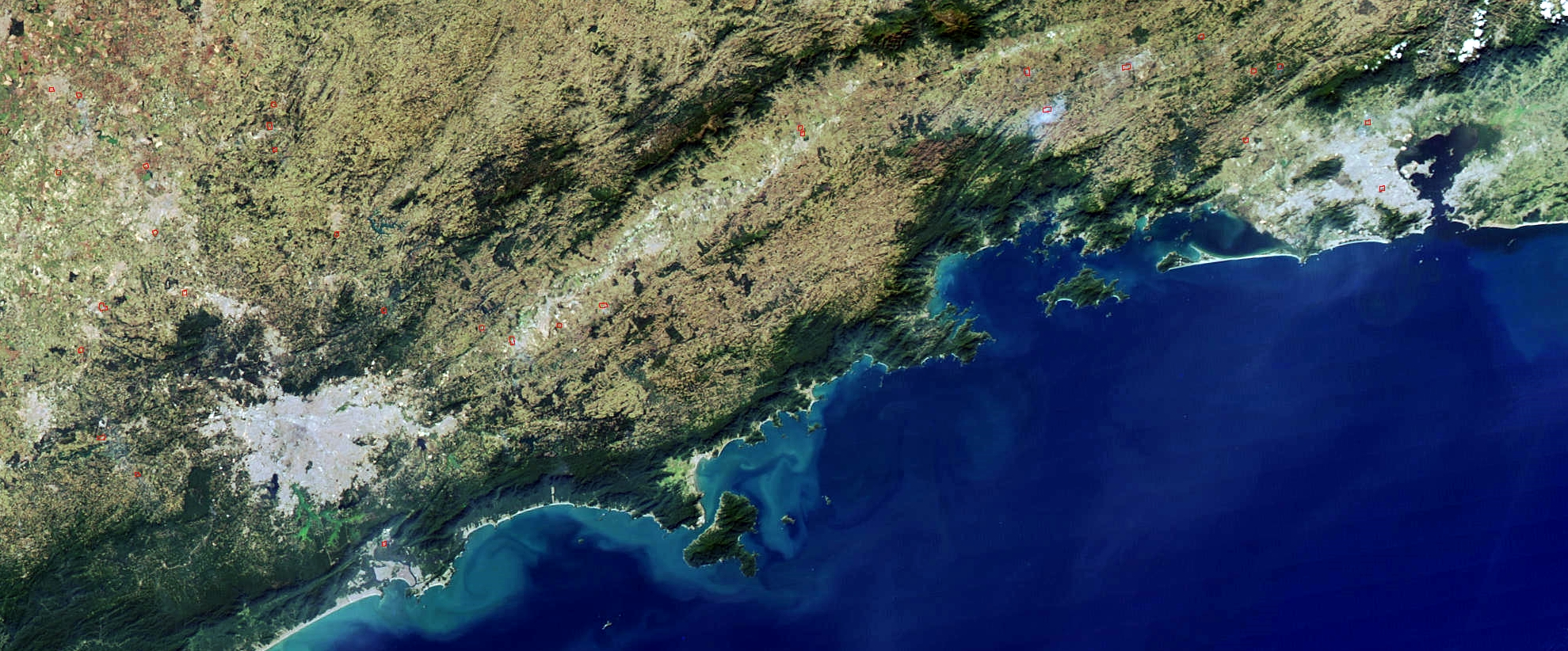 Megalopolis Rio-São Paulo